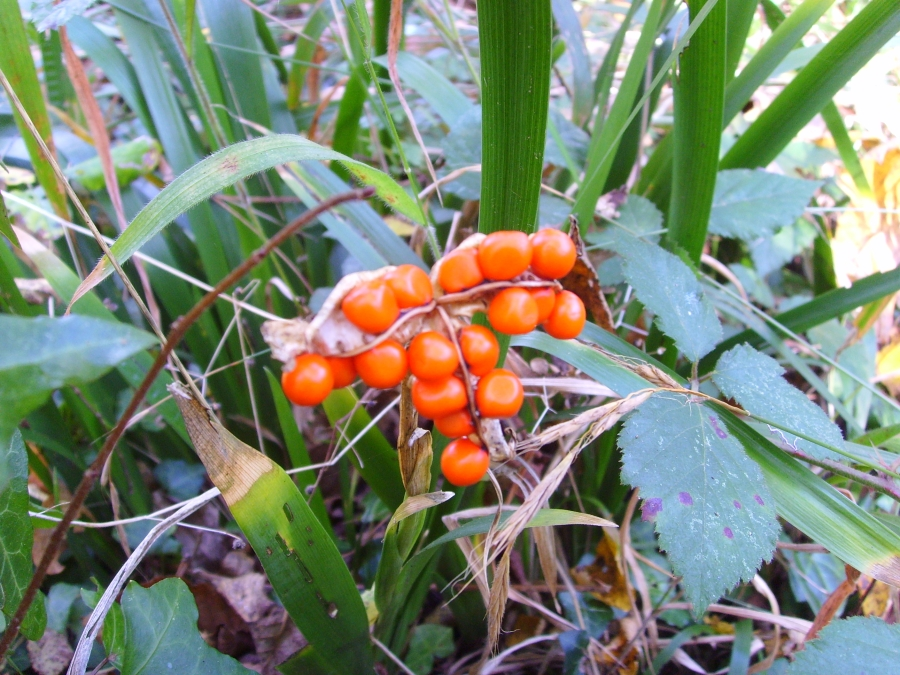 Graines d'Iris foetidissima (Cap Sizun, Bretagne, France)